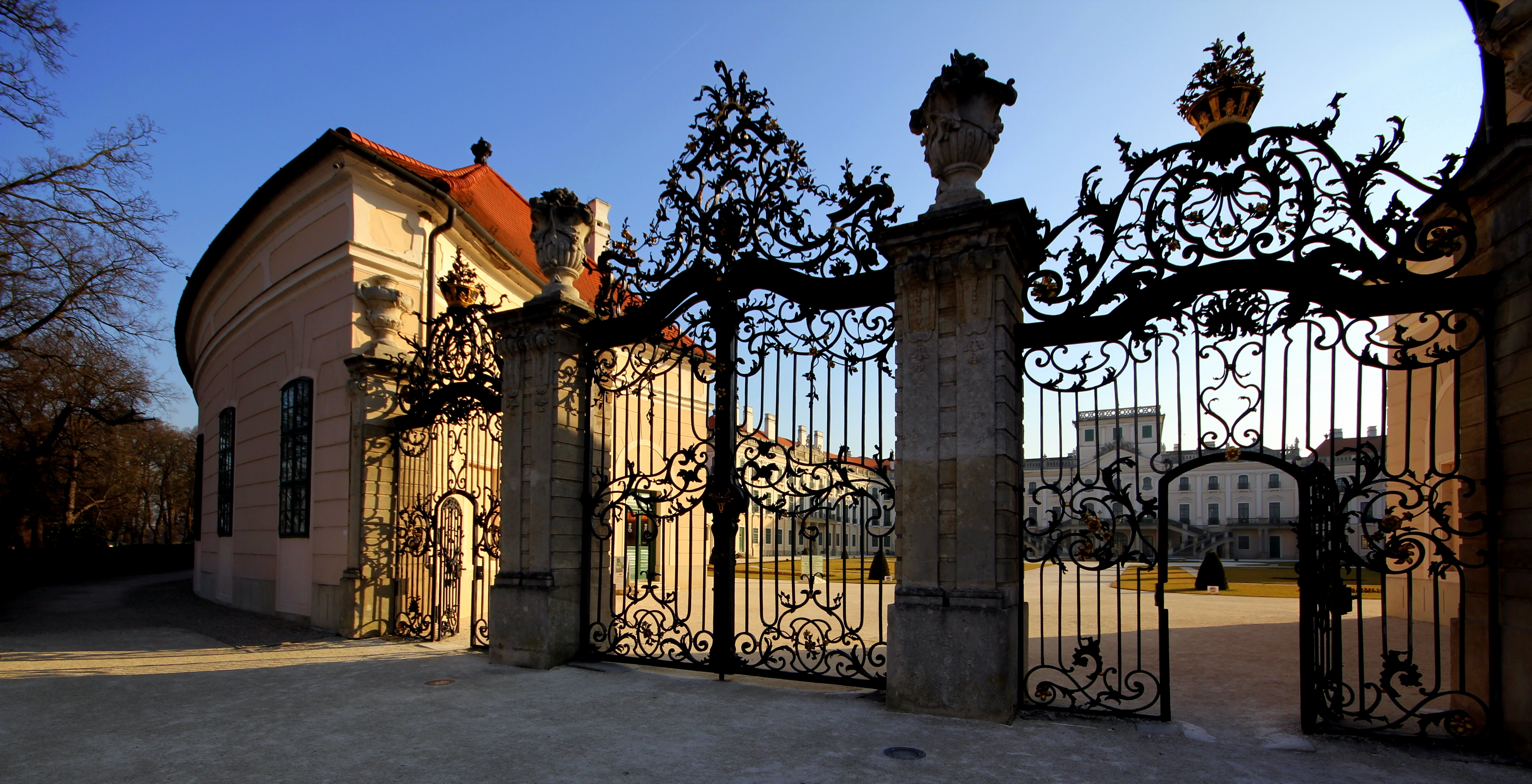 Esterházy-kastély – kastély, Fertőd This is a photo of a monument in Hungary. Identifier: 4051